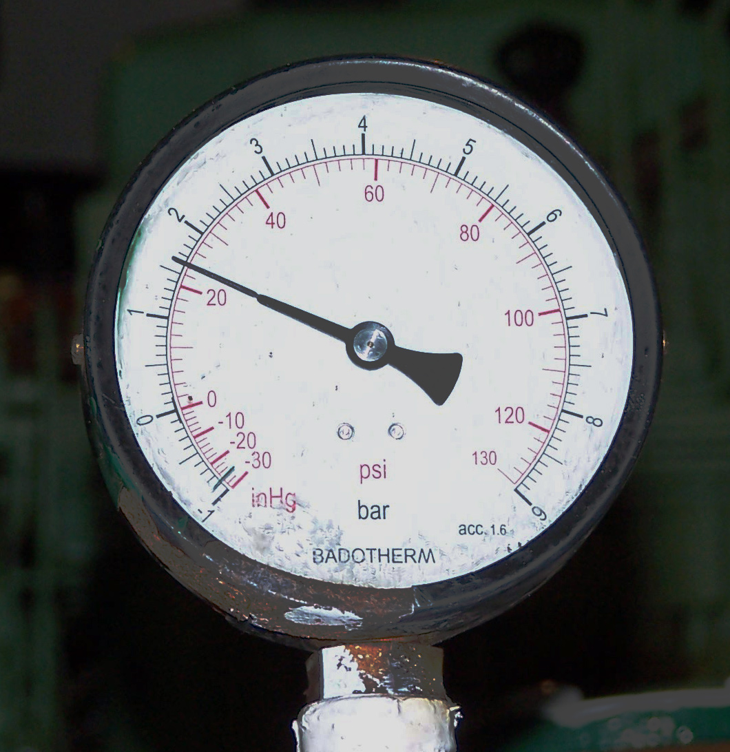 Le Tamer Kiran en train de charger des céréales au Port autonome de La Rochelle, un jour pluvieux. Le Tamer Kiran est un navire cargo polyvalent sorti des chantiers navals turcs Gemak en 1983. Il est la propriété du groupe Kiran, basé à İstanbul, et navigue sous pavillon turc.